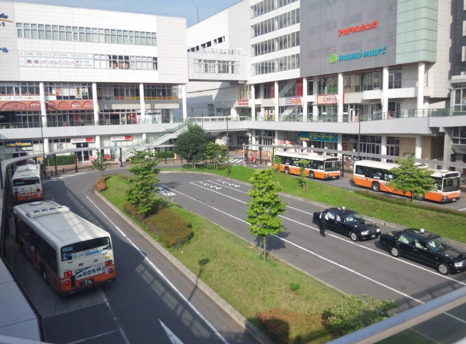 南柏駅東口ロータリー